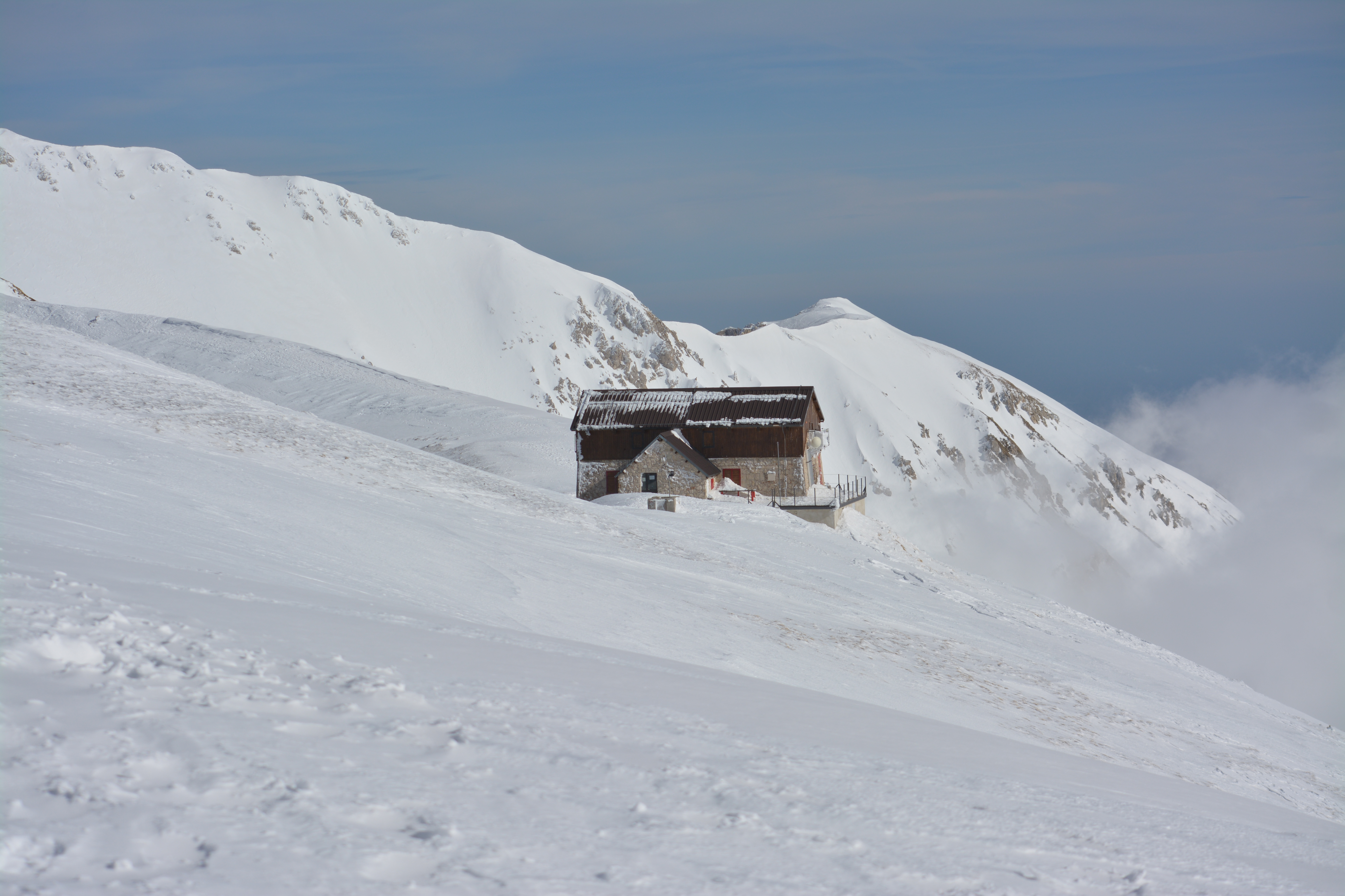 parco nazionale del Gran Sasso e Monti della Laga (Q1027914)